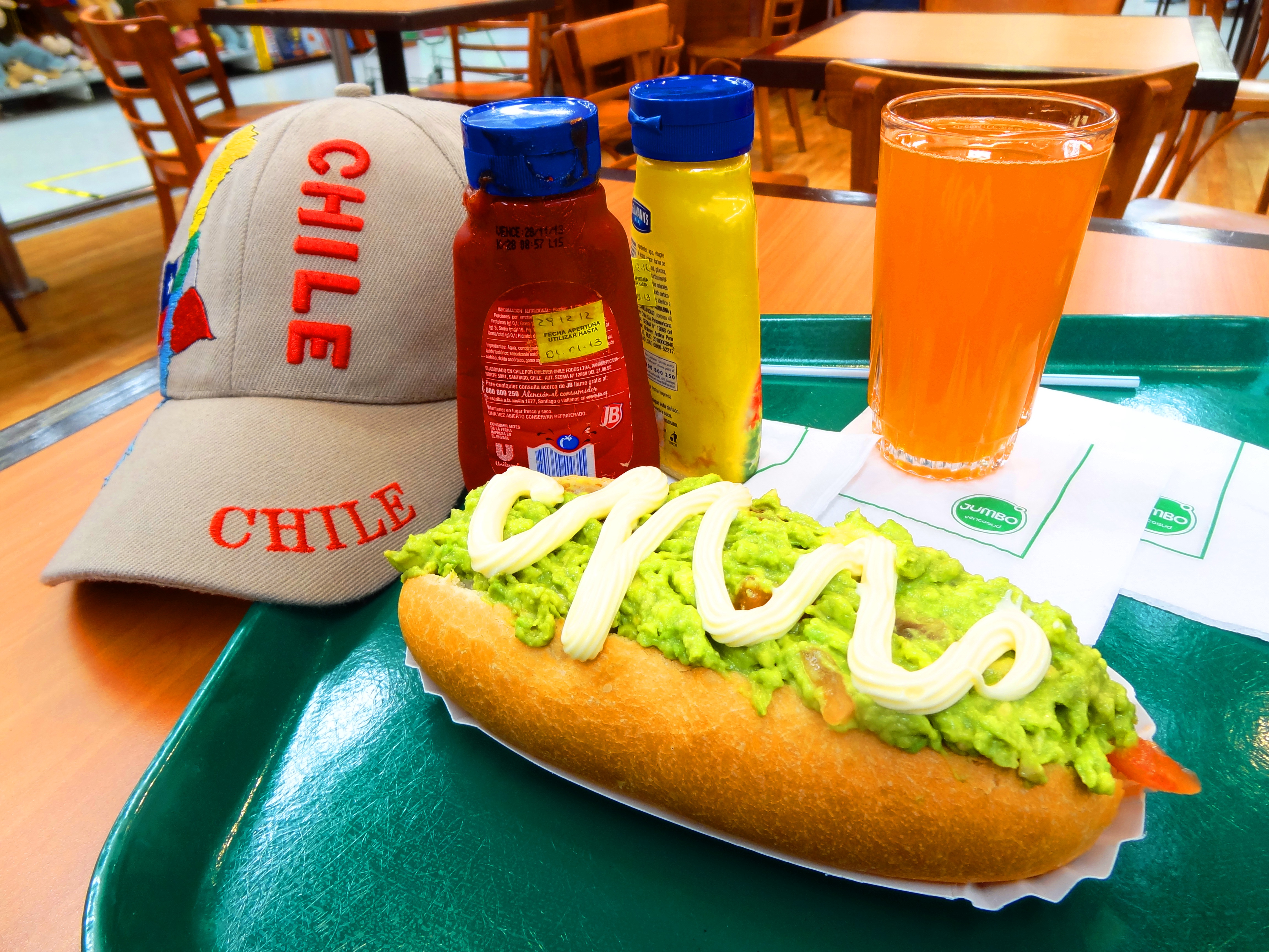 El orgullo de los chilenos.